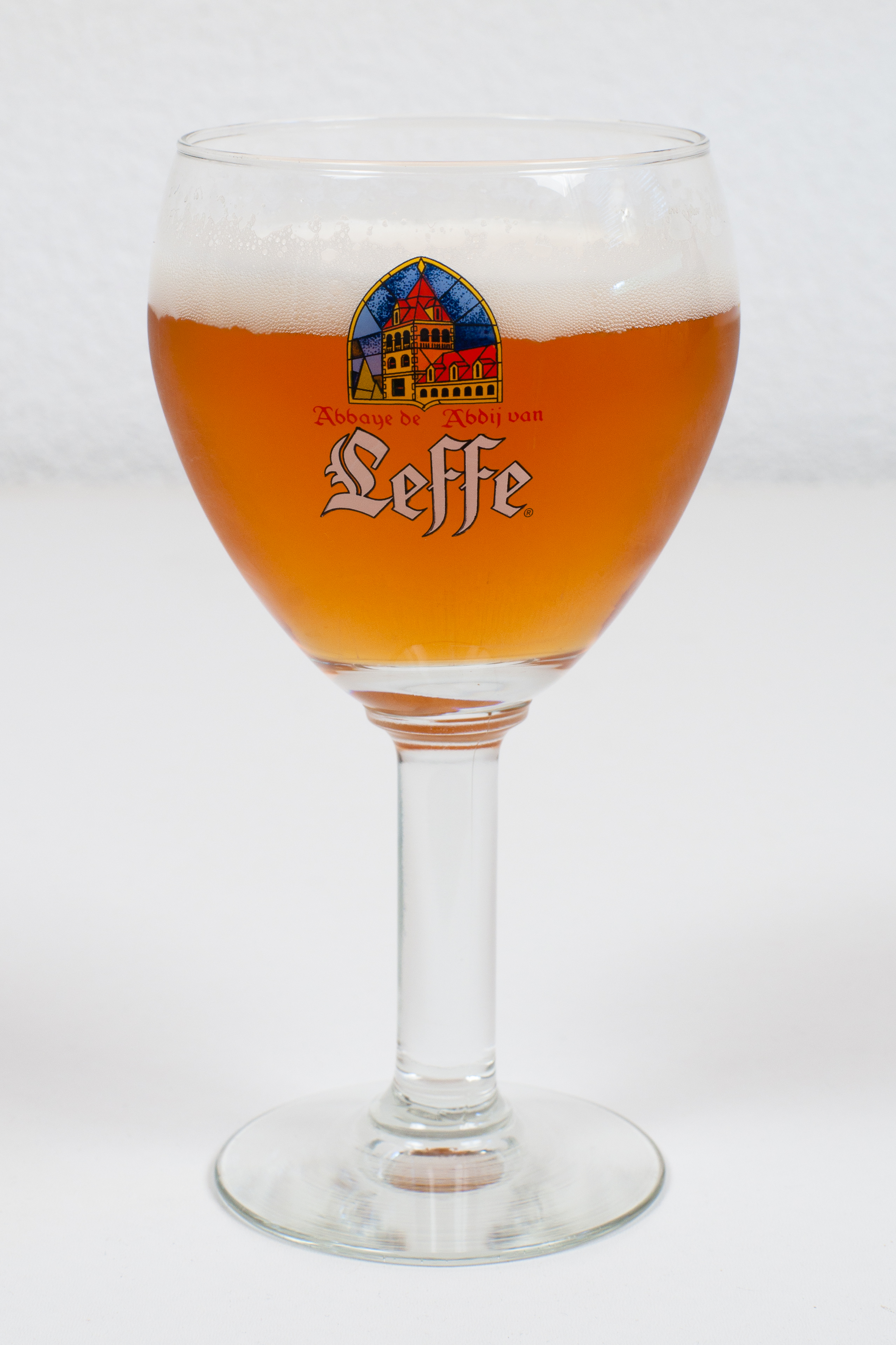 Leffe blonde en verre